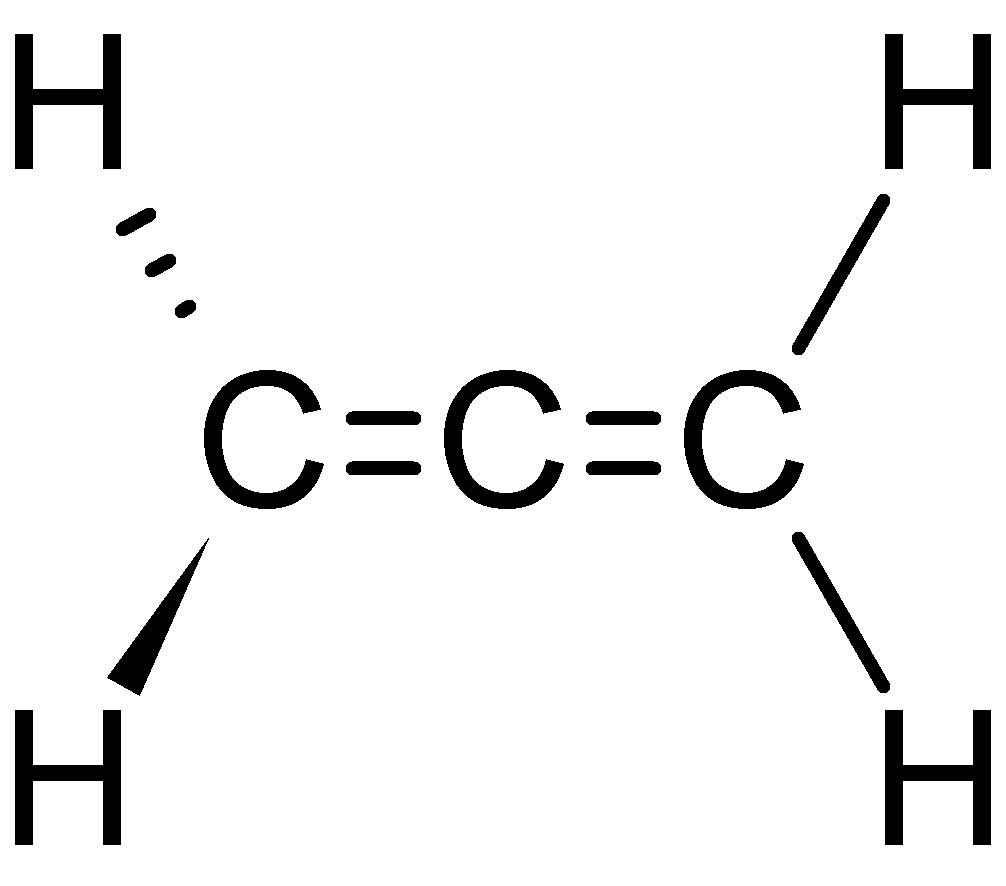 By Magnus Manske